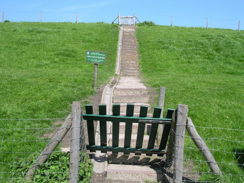 Dijkopgang van een dijk, in dit geval die van de Westfriese Omringdijk. Path to the top of dyke, in this case the Westfriese Omringdijk by Andijk.